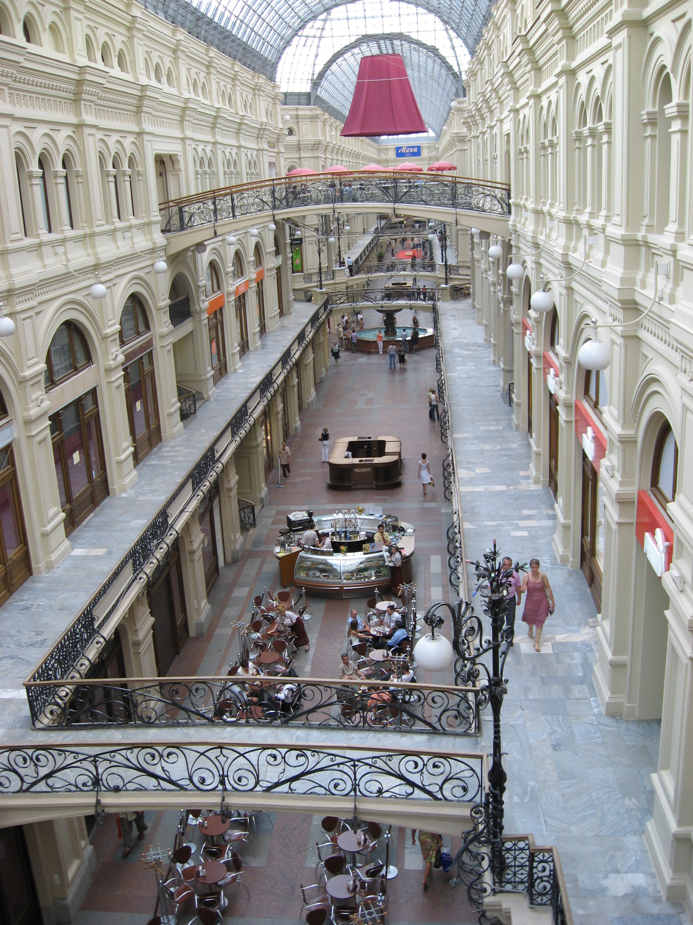 Moscow GUM